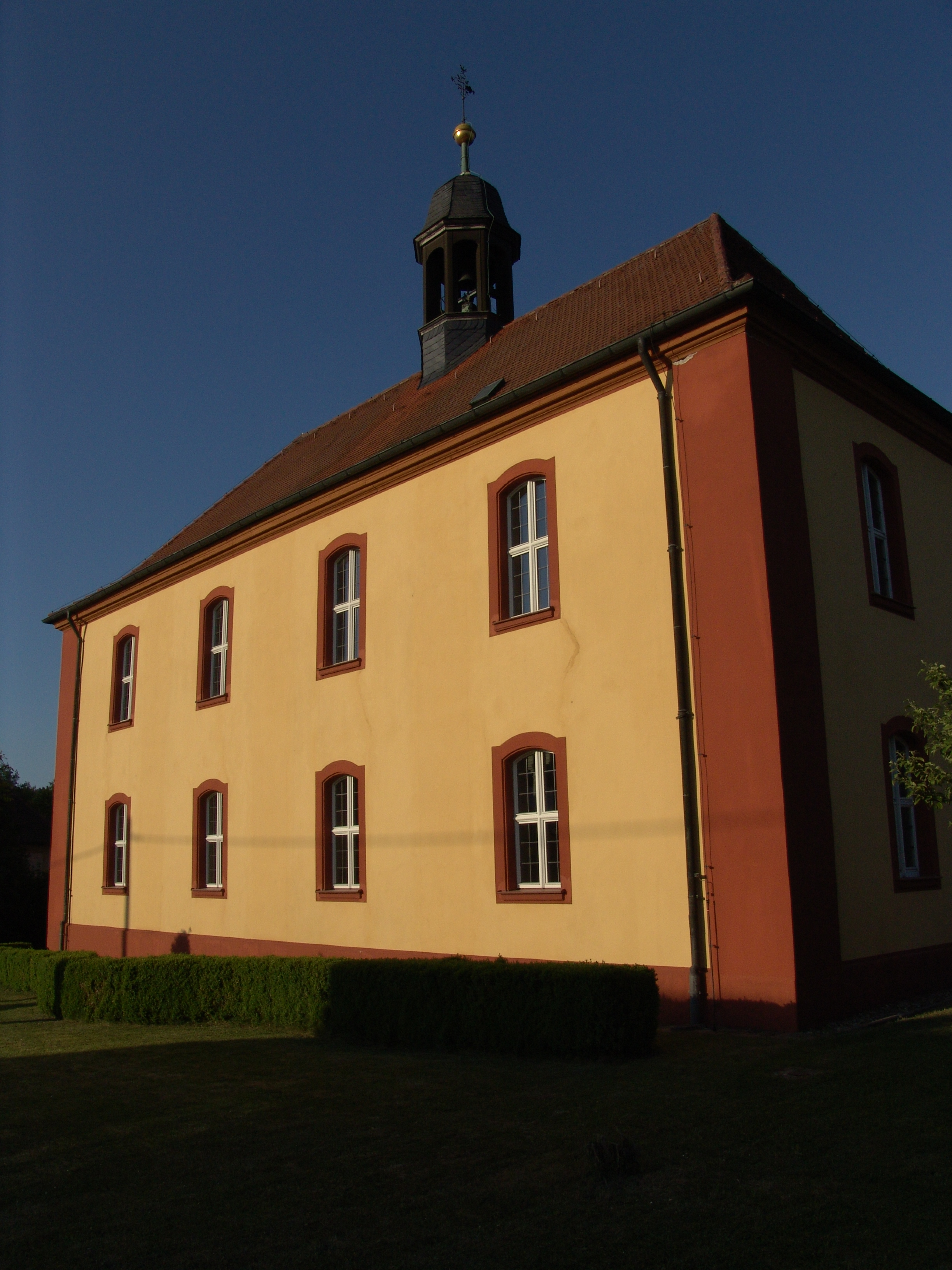 evang.-luth. Kirche in Rehweiler